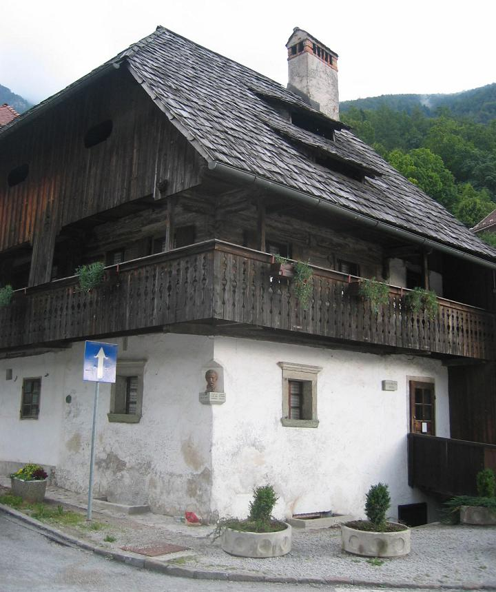 Tržič, Slovenia (Kurnik's house) photo:Ziga 12:06, 21 October 2006 (UTC)